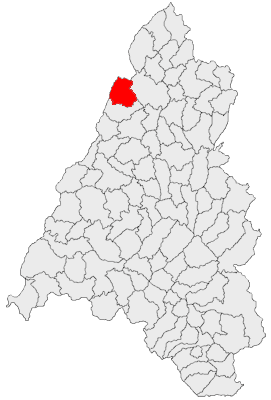 Categorie:Hărţi ale judeţului Bihor